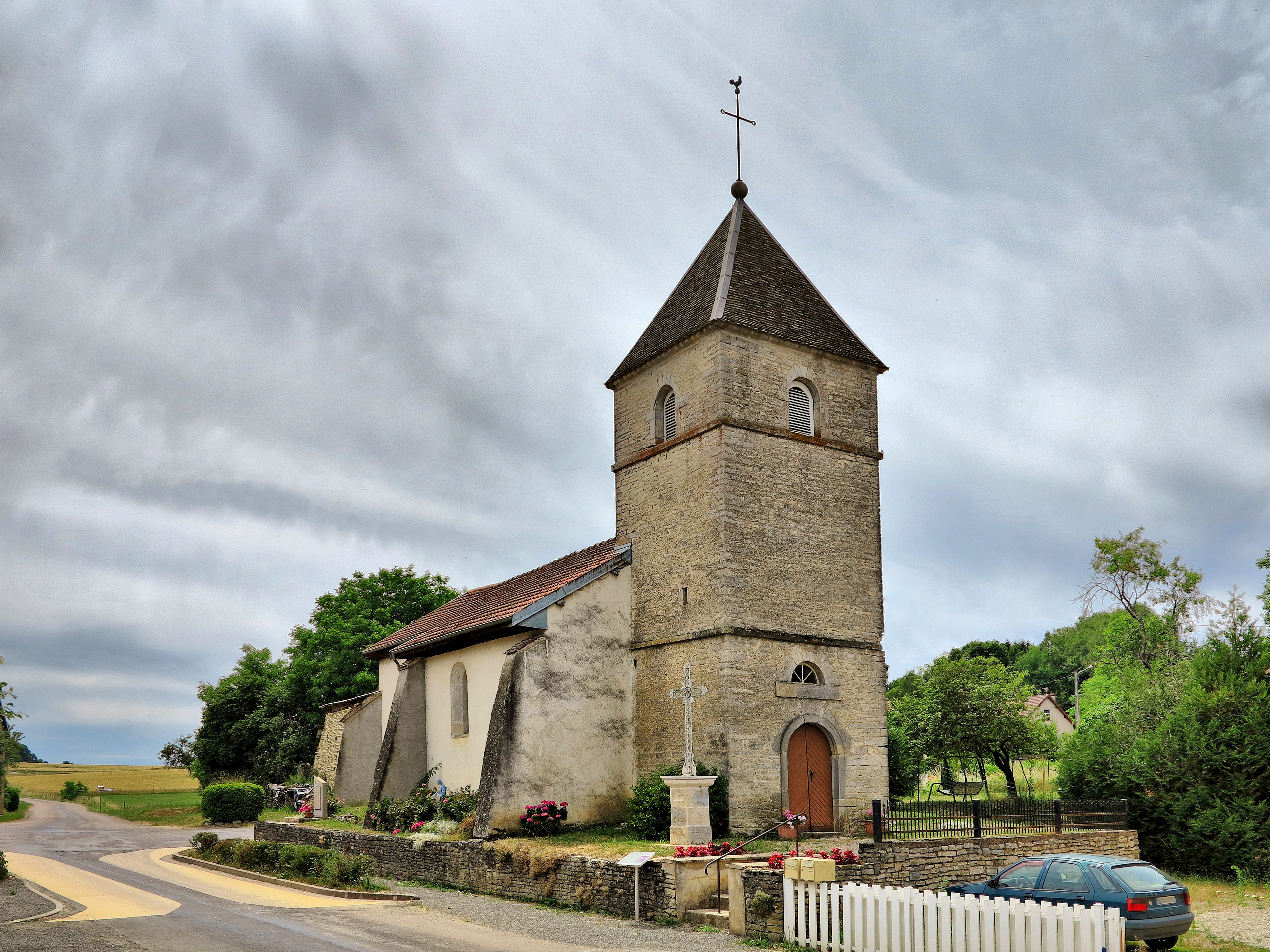 L'église